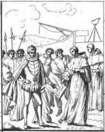 "Le roi Henri III fait voir au bienheureux dom Jean de la Barrière le plan du monastère qu'il lui fait bâtir à Paris" (Vitrail du cloître du couvent des Feuillants de Paris).